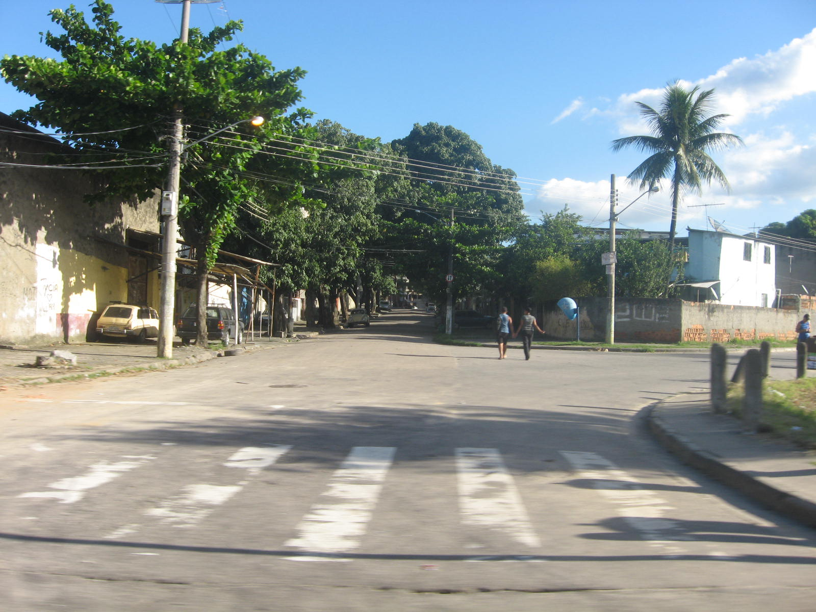 Vista de Engenho da Rainha, bairro da zona norte da cidade do Rio de Janeiro.